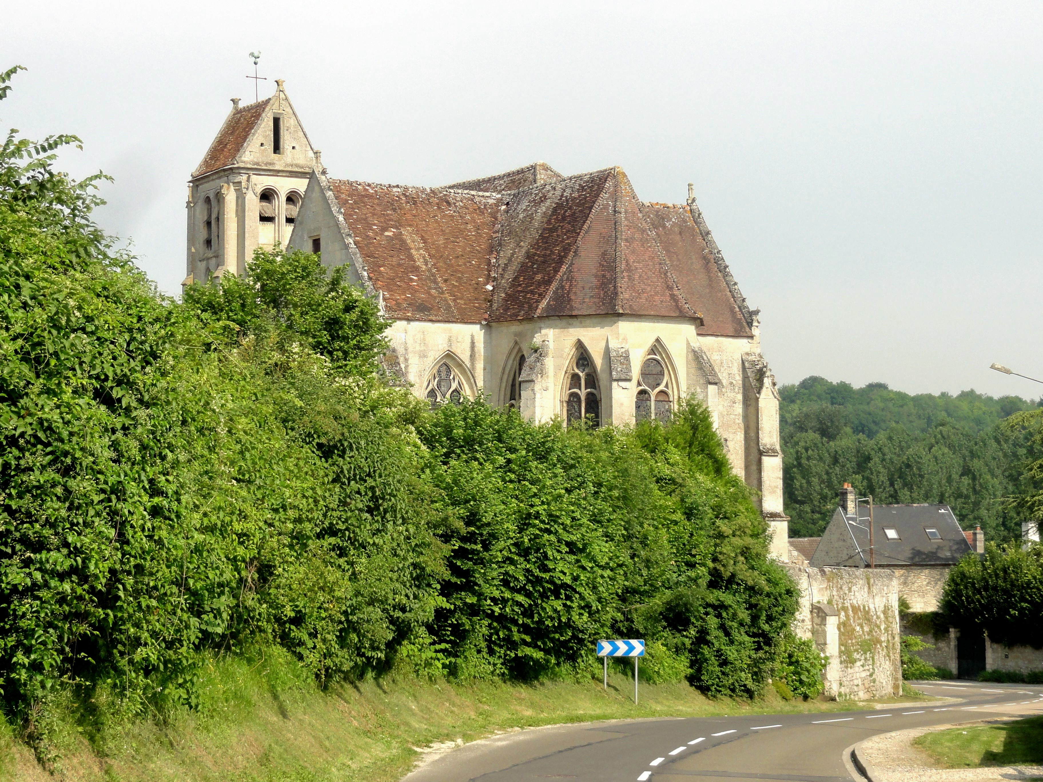 Vue depuis l'est.